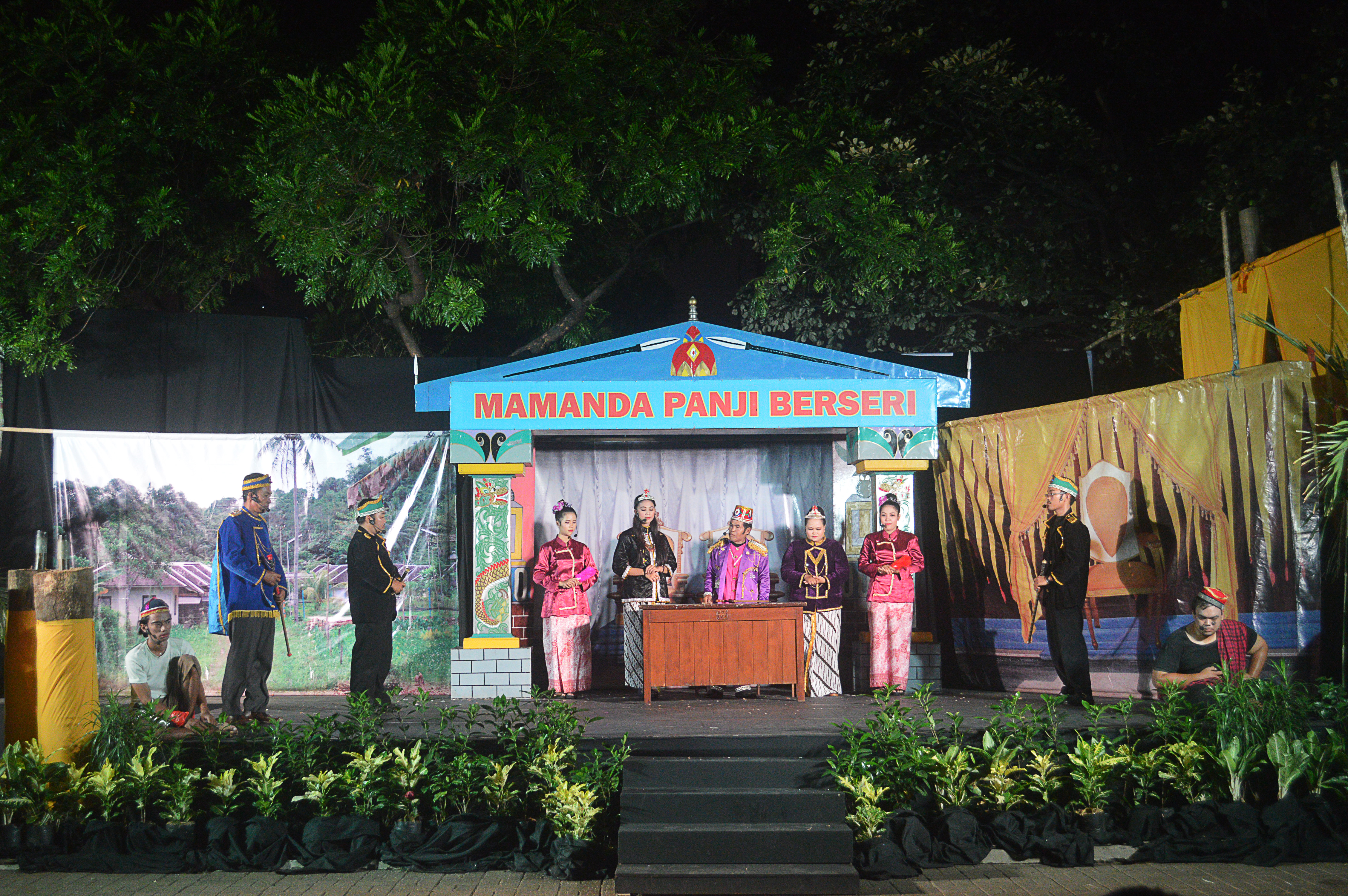 Mamanda Panji Berseri, seni teater tradisional masyarakat Kutai, Kalimantan Timur.